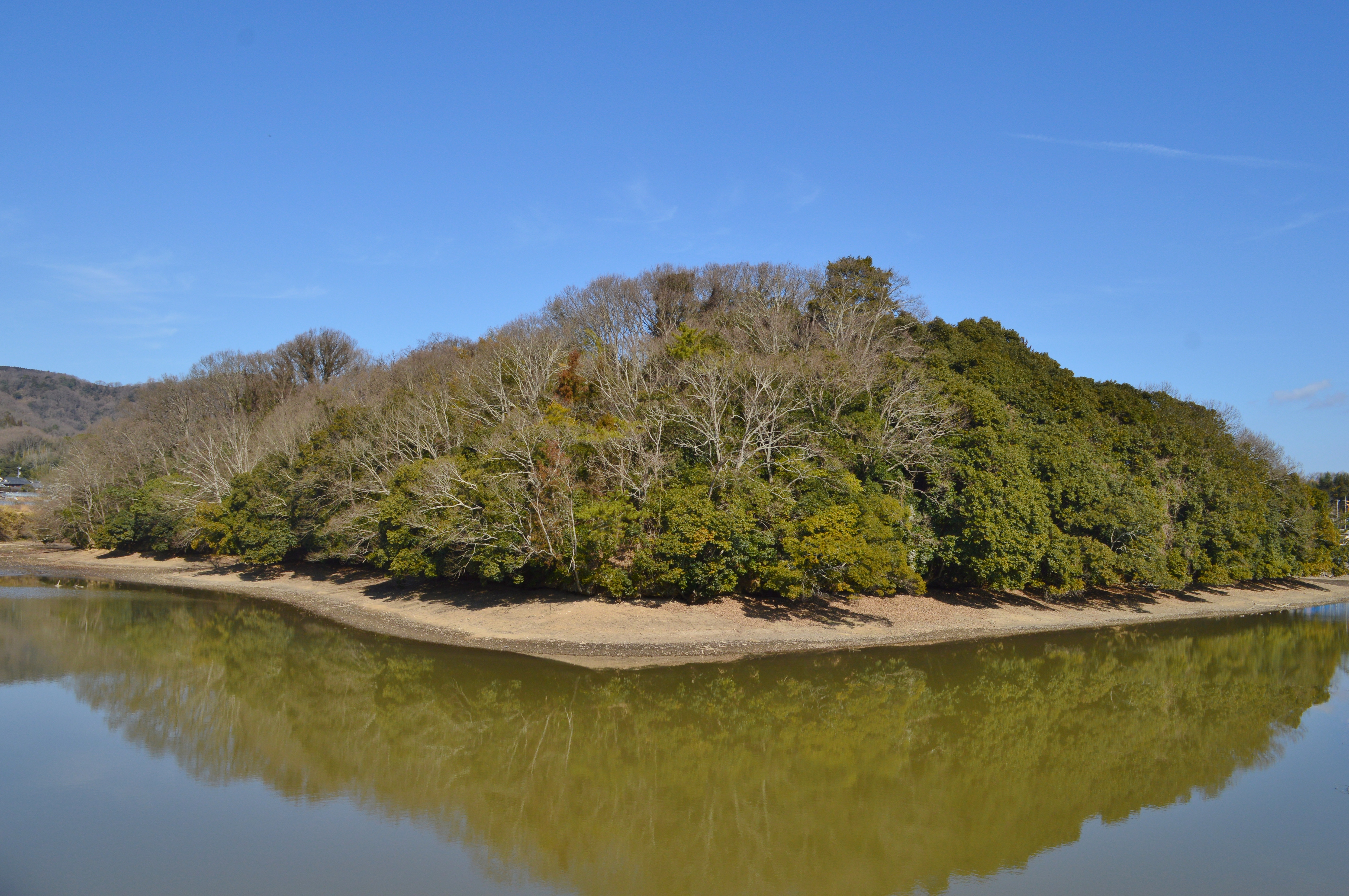 両宮山古墳 墳丘全景 Nikon D3200